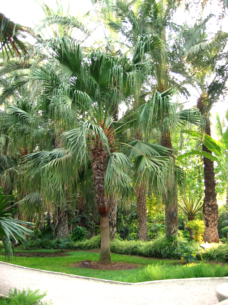 Livistona chinensis en el Huerto del Cura